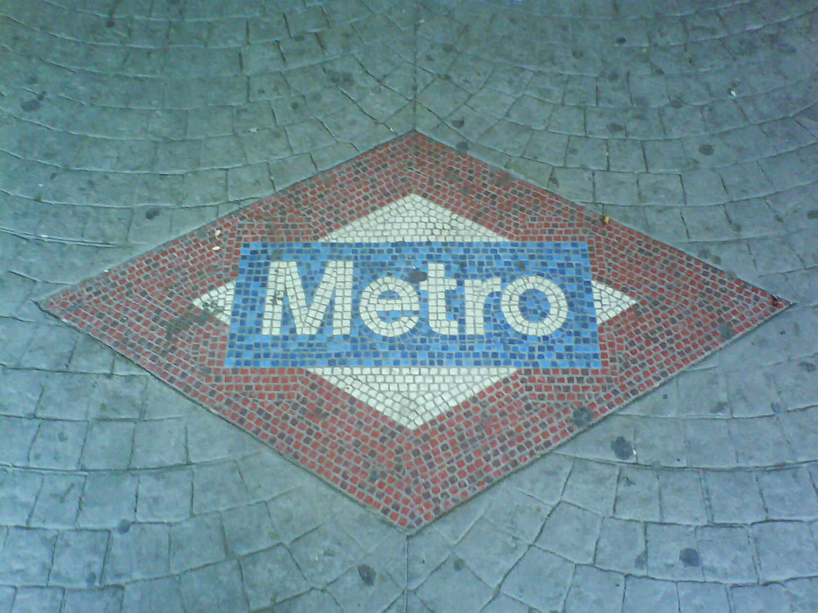 Mosaico en la estación de Lago del Metro de Madrid.